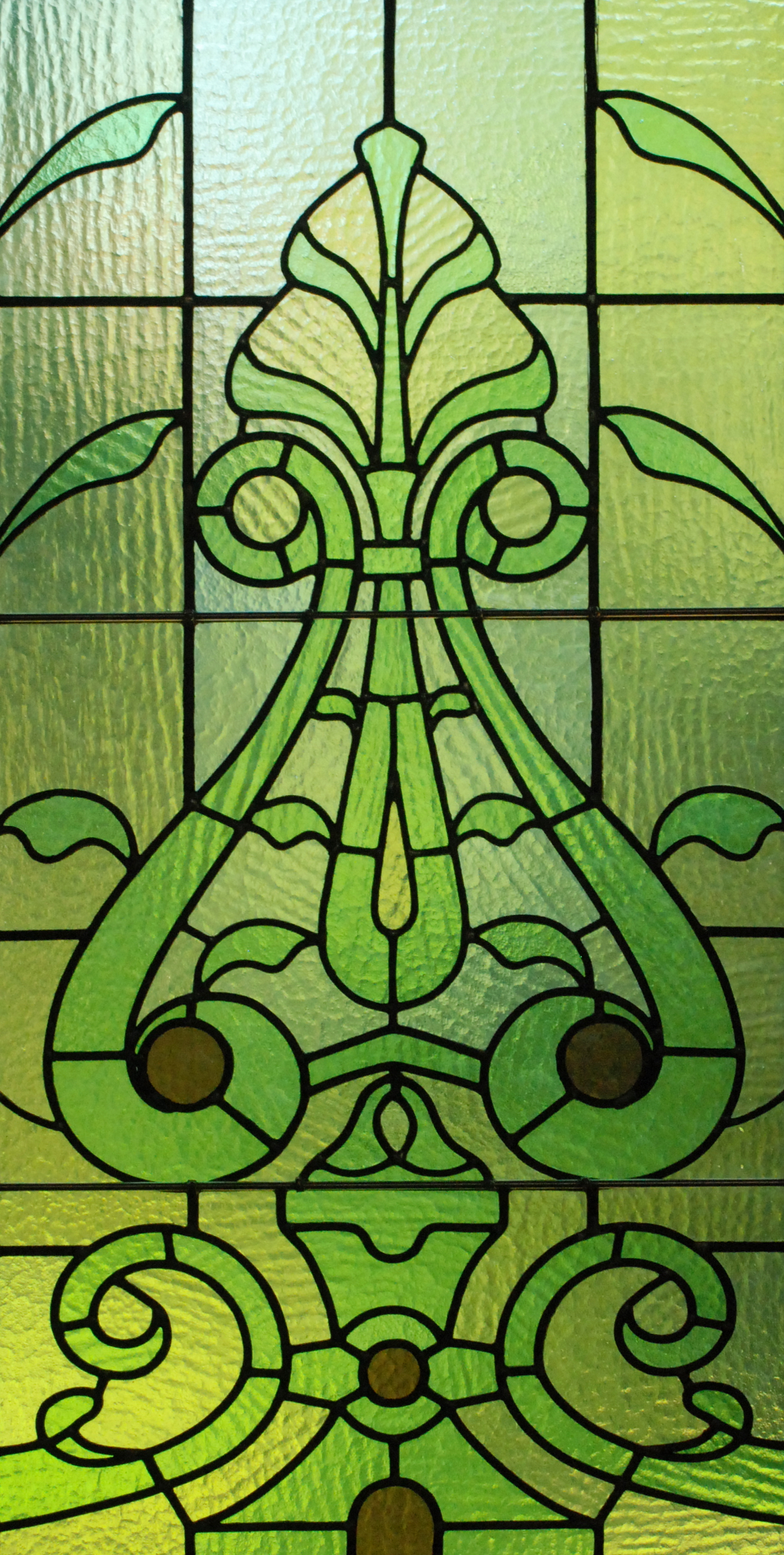 Belgique - Bruxelles - Bibliothèque Solvay